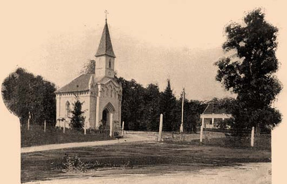 Báró Sennyei Miklós kápolnája Nagycigándon külterületén lévő Erzsébet-tanyán.